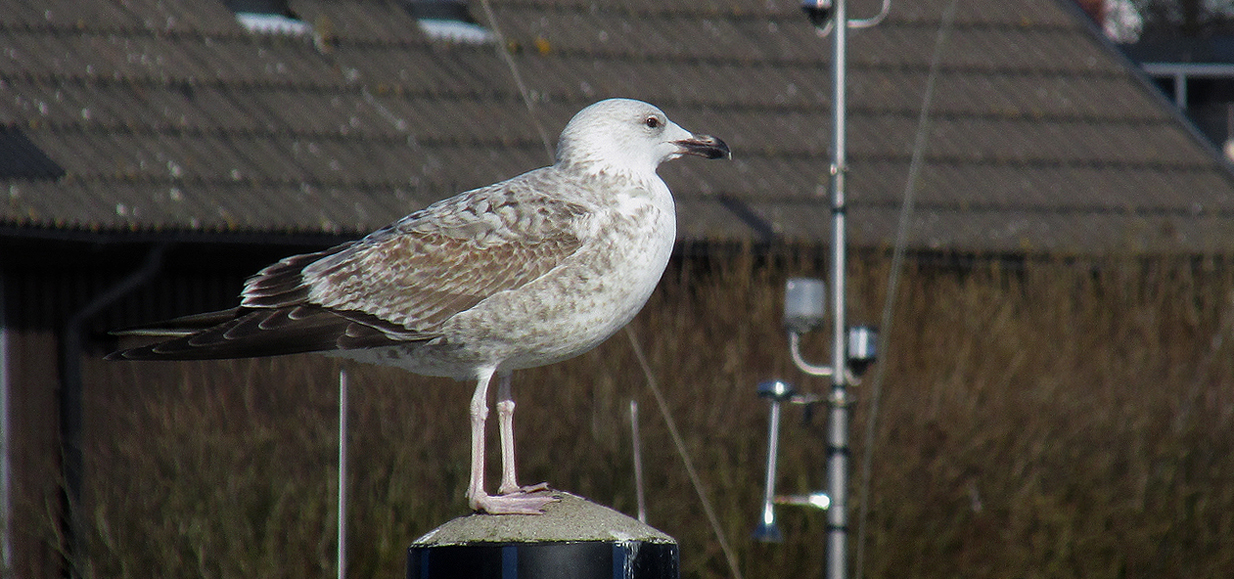 Kaspisk trut (2k) i Ystads småbåtshamn 13 mars 2015